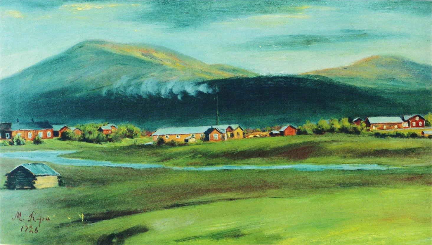 Maija Kellokummun maalaus Kuolajärven kylästä eli Sallan vanhasta kirkonkylästä, etualalla Kuolajoki ja keskellä kylää saha. Kylä tuhoutui myöhemmin sodassa ja alue luovutettiin Neuvostoliitolle. Maalaus kuuluu Rovaniemen taidemuseon kokoelmiin.